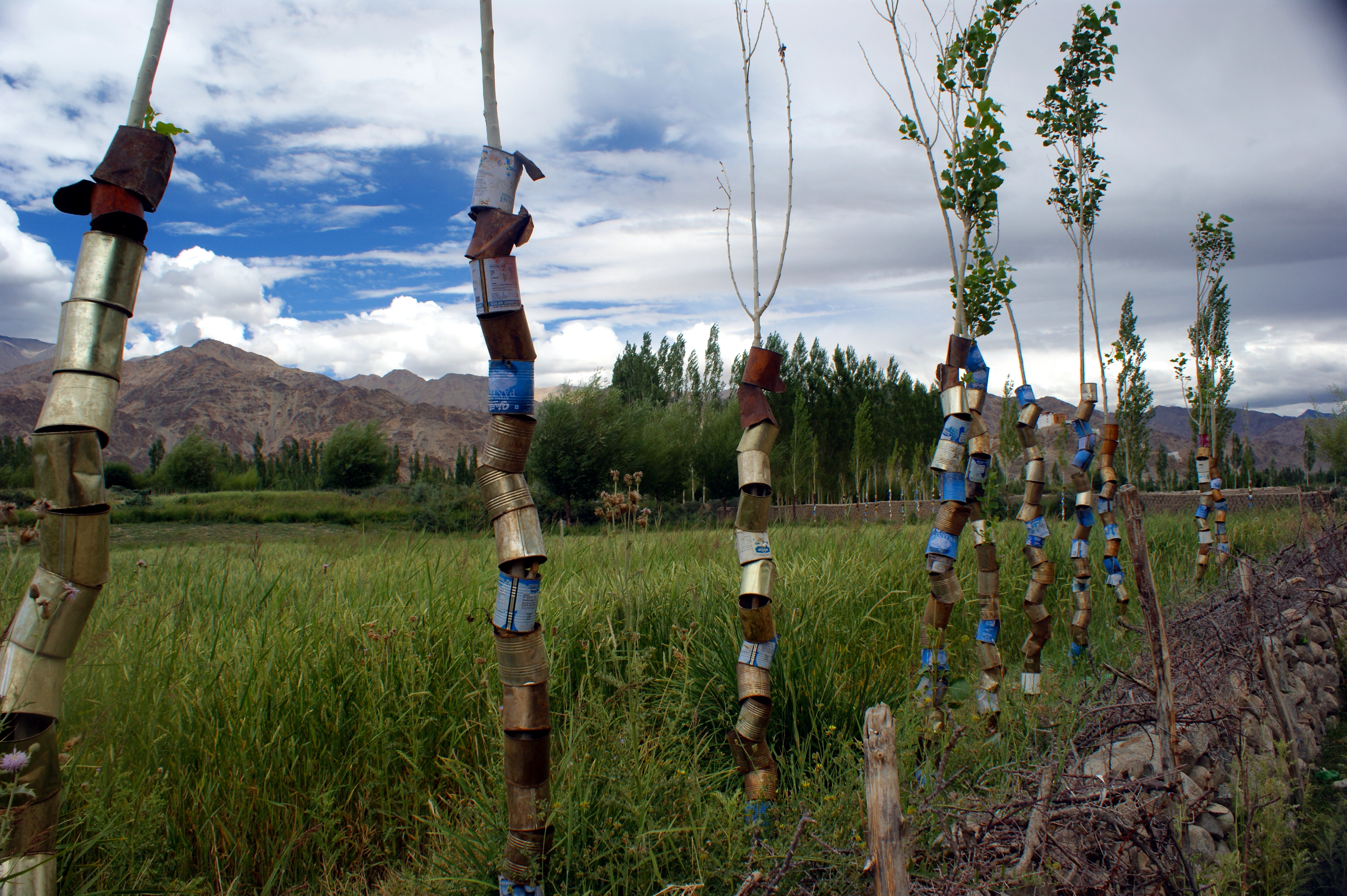 Diese Bäume in Ladakh, Nordindien, werden mit alten Dosen vor Tieren geschützt